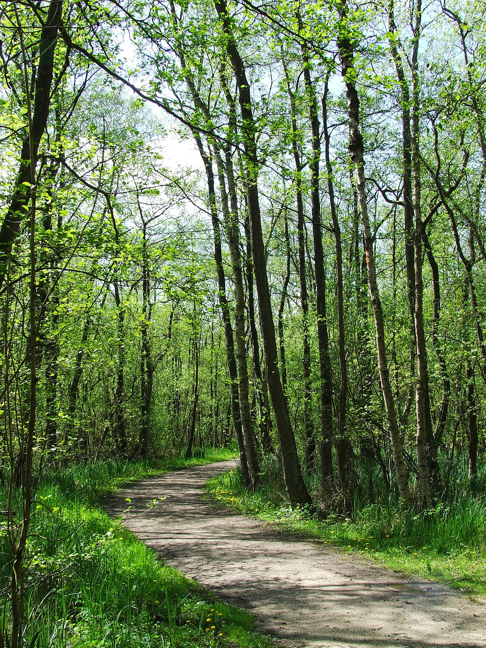 Wald im Landschaftsschutzgebiet Hemmelsdorfer See und Umgebung (Schleswig-Holstein). Zu sehen ist der Wanderweg, der aus Richtung Niendorf kommend zum Hermann-Löns-Blick führt. Rechts und links des Weges befinden sich Feuchtgebiete mit den dafür typischen Pflanzen wie Sumpf-Schwertlilie, Sumpfdotterblume oder Birke.